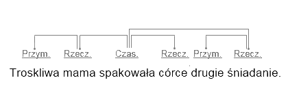 Wykres analizy zależnościowej zdania.